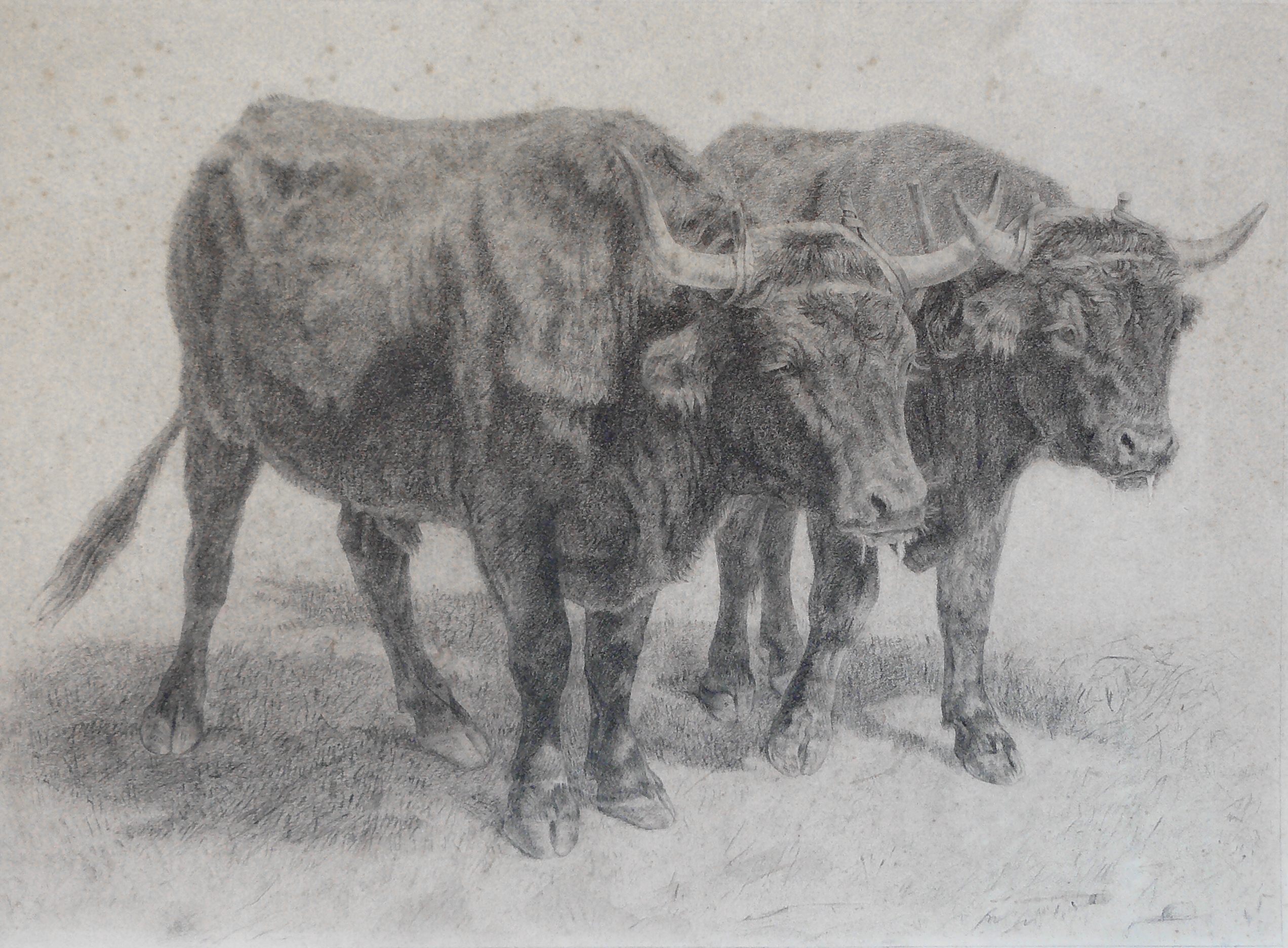 Bonheur Rosa - Charcoal - Boeufs du Cantal - 53x38cm; Il s’agit d’une œuvre préparatoire à la lithographie de Rosa Bonheur, lithographié par Soulange-Teissier. Il s’agit aussi d’une étude pour « la fenaison en Auvergne », un grand tableau de 1855 (Fontainebleau). La lithographie évoquée est visible ici